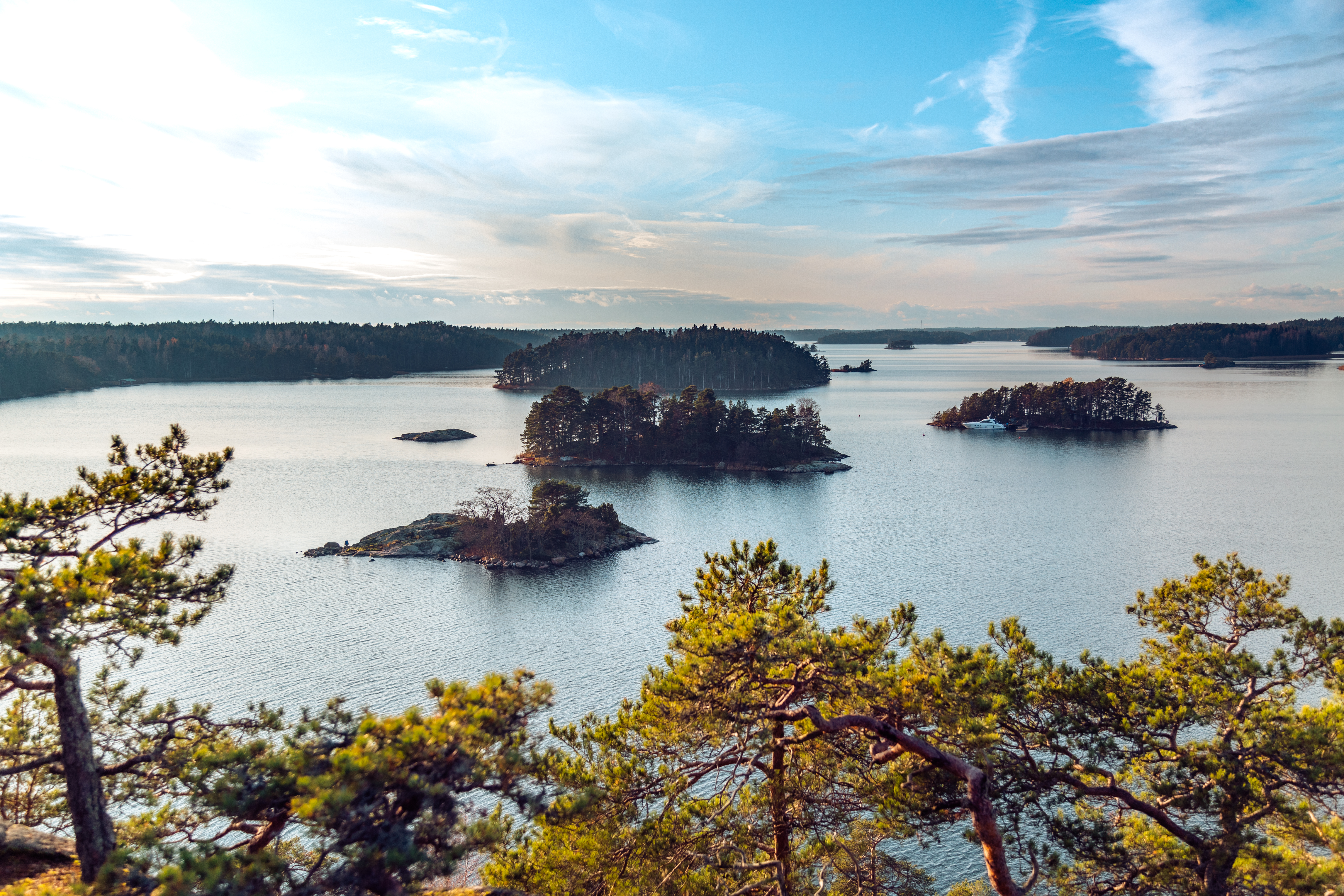 Utsikt från Fornborgen Bornholm i Hangslax, Nagu.